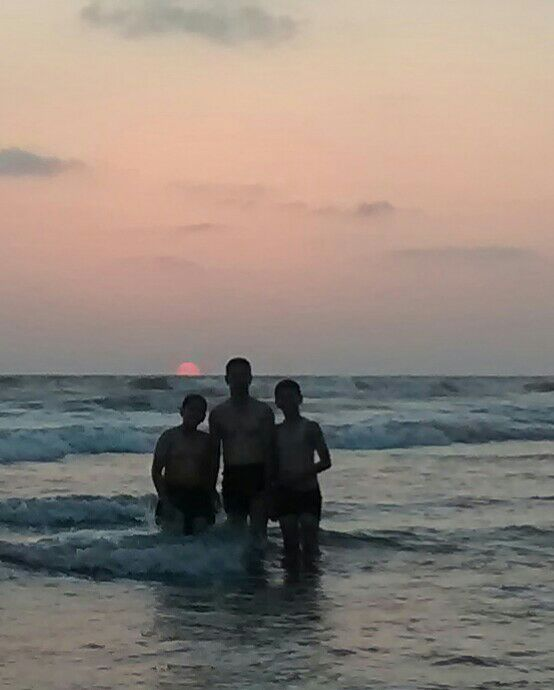 मे मधील सूर्यास्त